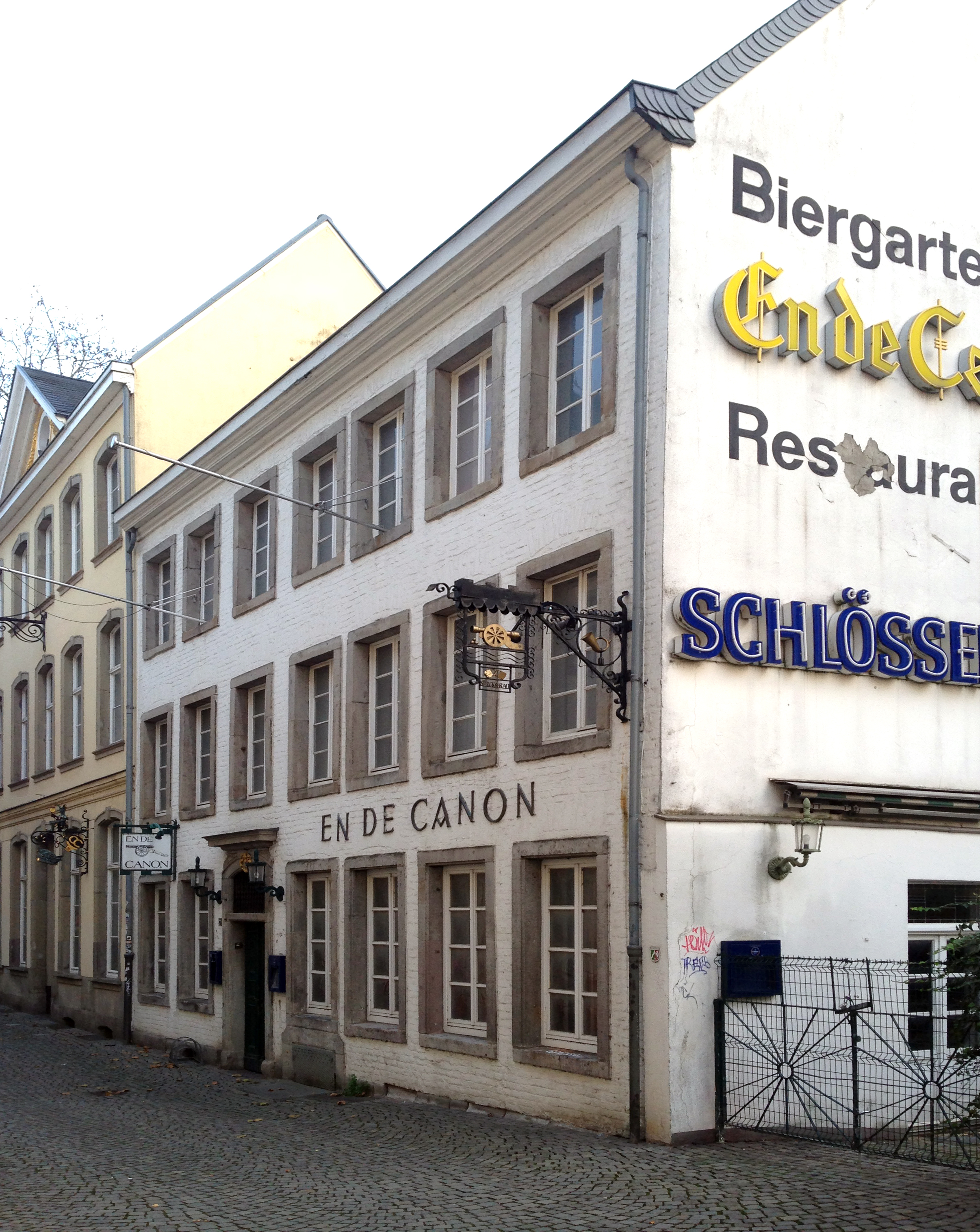 En de Canon, Zollstraße 7, Düsseldorf-Altstadt